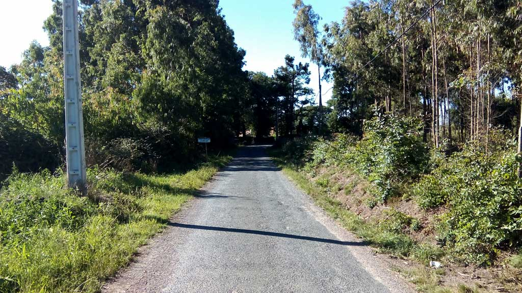 Vista do Abelar, Curtis.